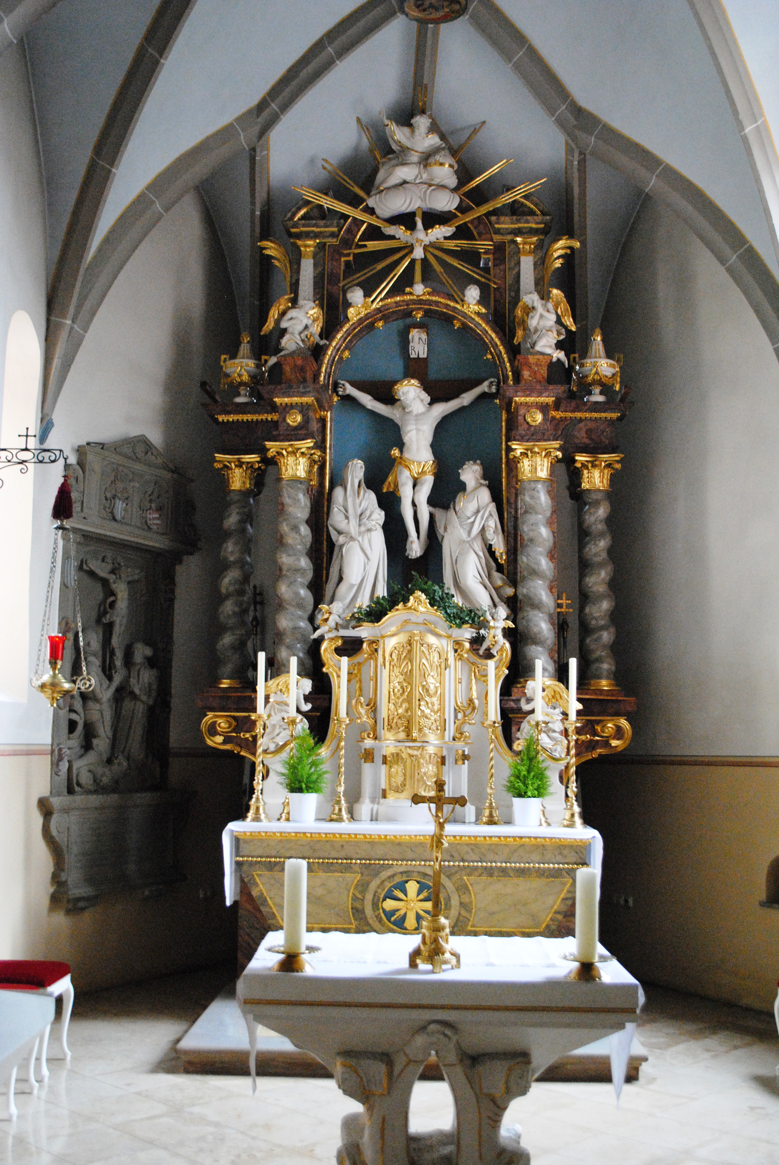 Hochaltar, Kirche Astheim, Volkach